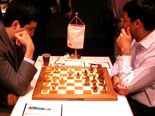 Wladimir Kramnik - Viswanathan Anand, Dortmunder Schachtage 2007.